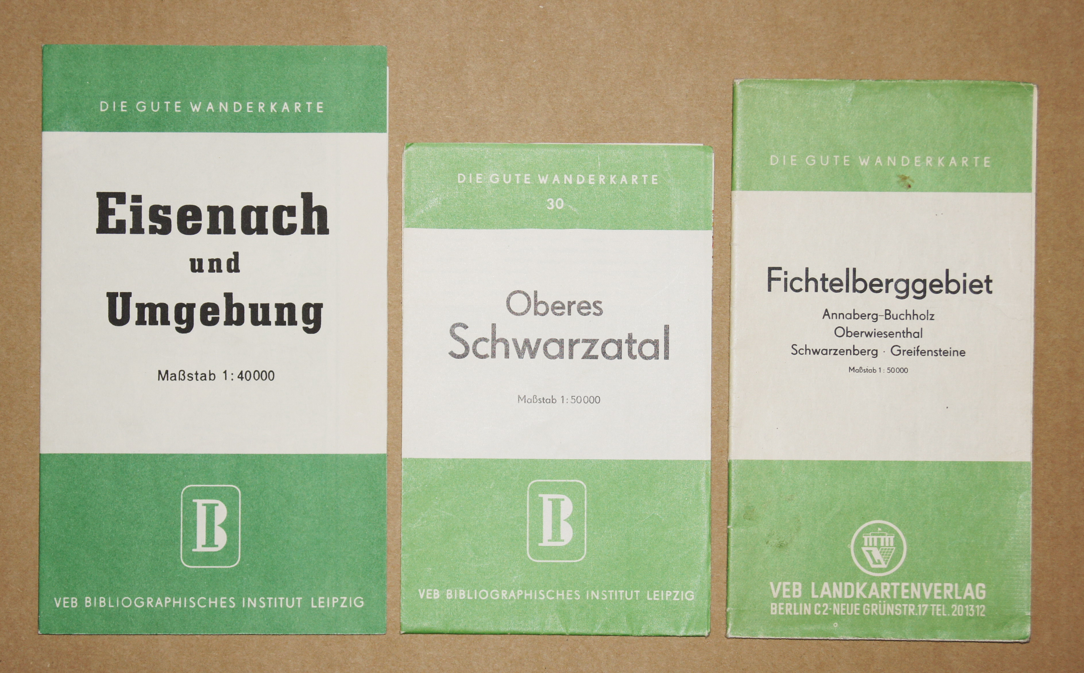 Fotografie von drei Exemplaren der "Guten Wanderkarte", erschienen 1954 bis 1961